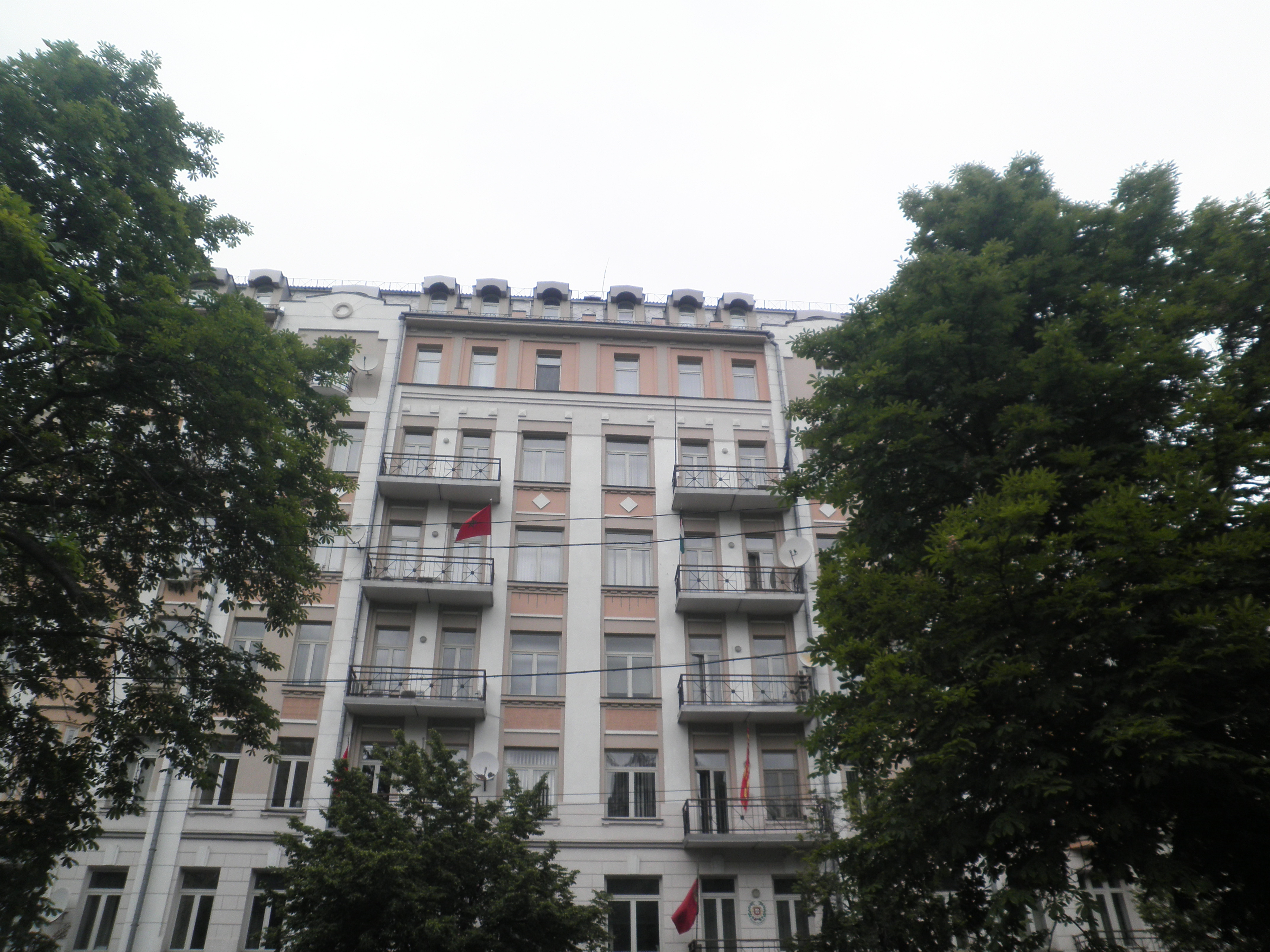 Посольства вул.Івана Федорова 12 Київ Україна